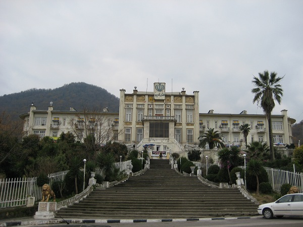 هتل بنیاد پهلوی هتل قدیم